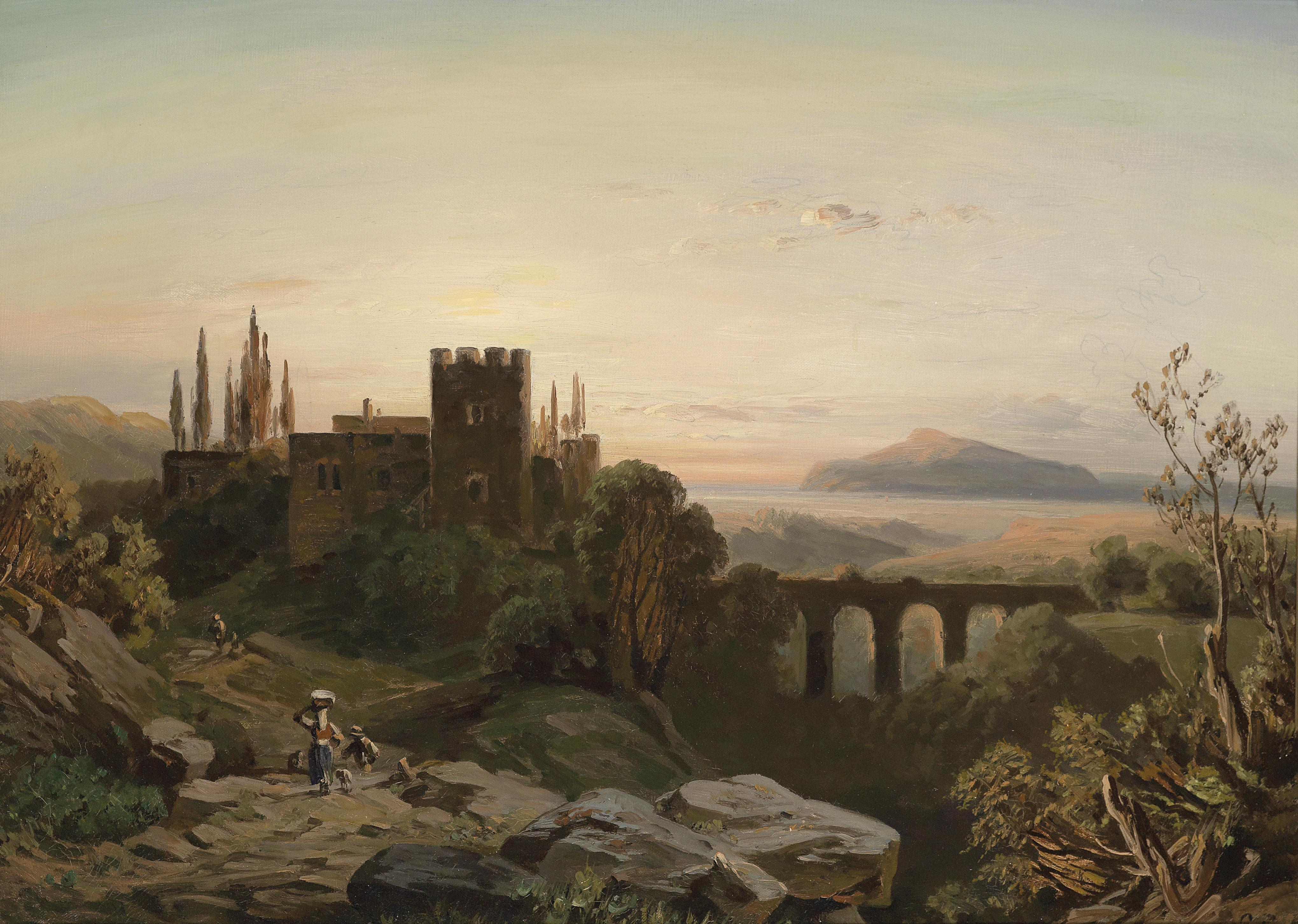 Südliche Ansicht im Abendrot, signiert Seidl, Öl auf Leinwand, 55 x 75 cm